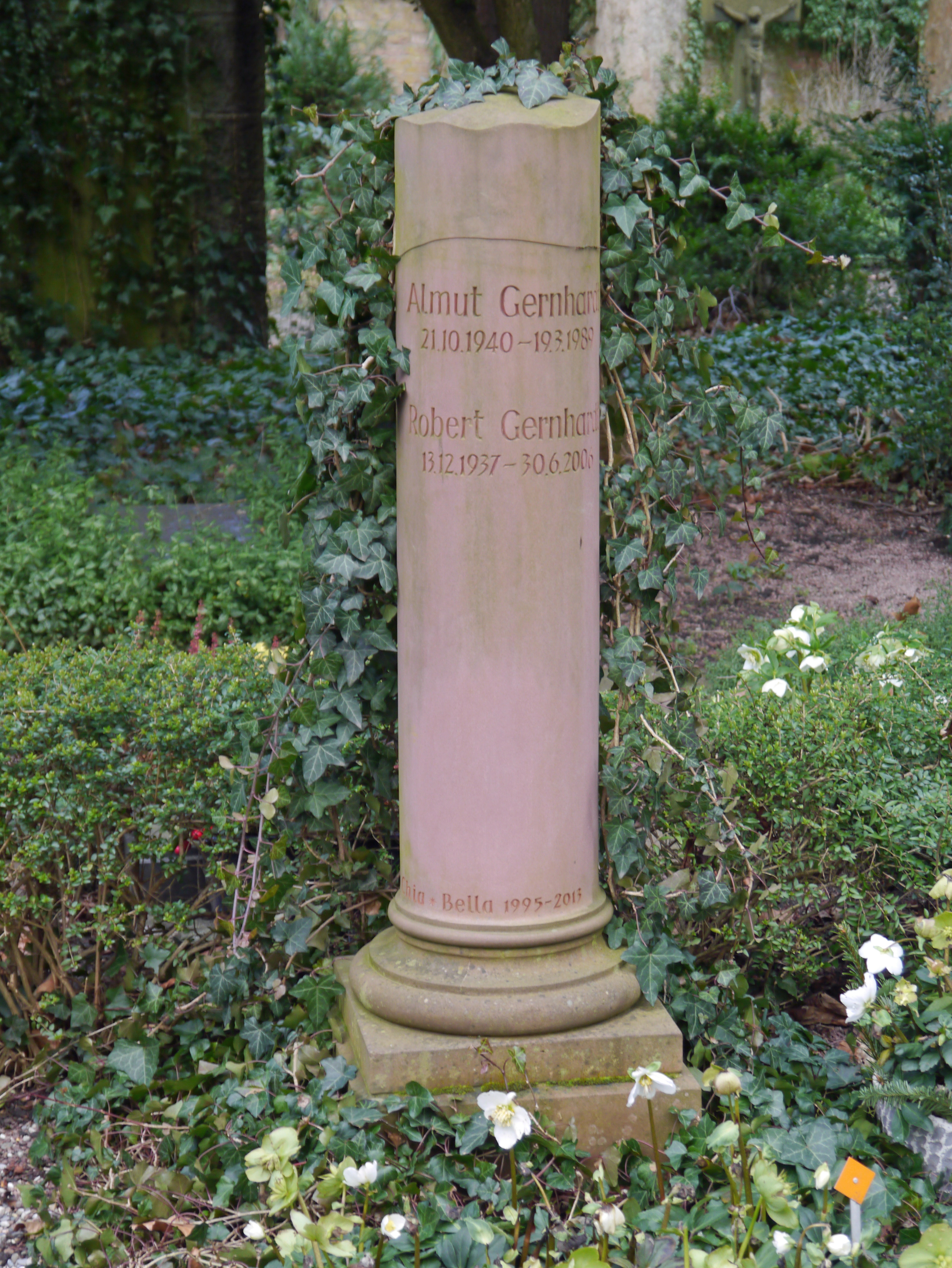 Grab des Paares Gernhardt auf dem Frankfurter Hauptfriedhof.